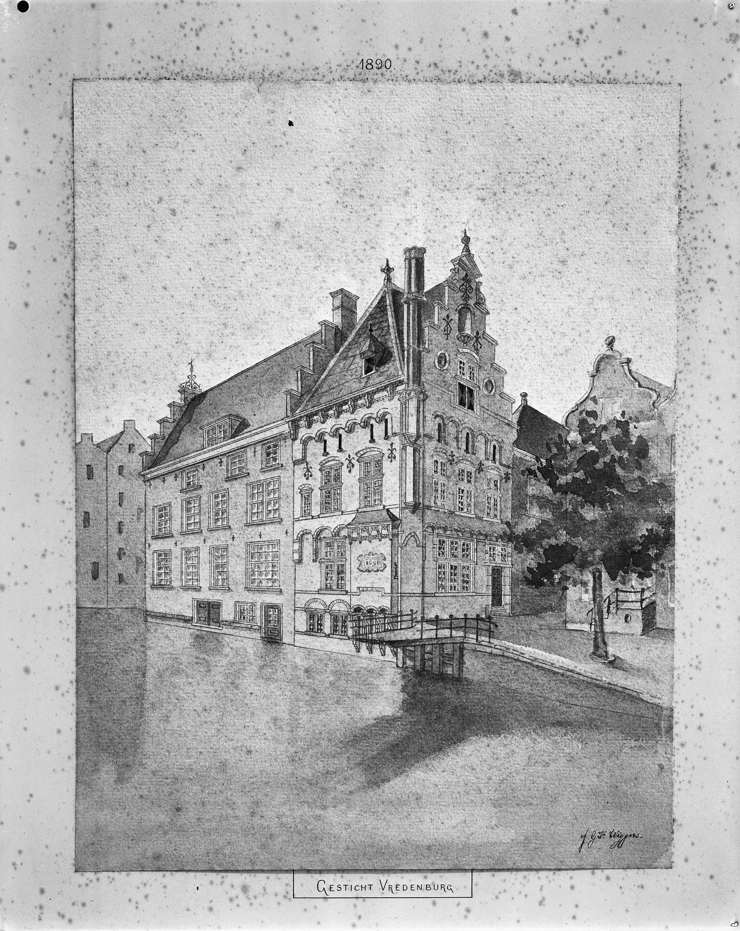 Huis Vredenburg: exterieur tekening A.C.Bleijs